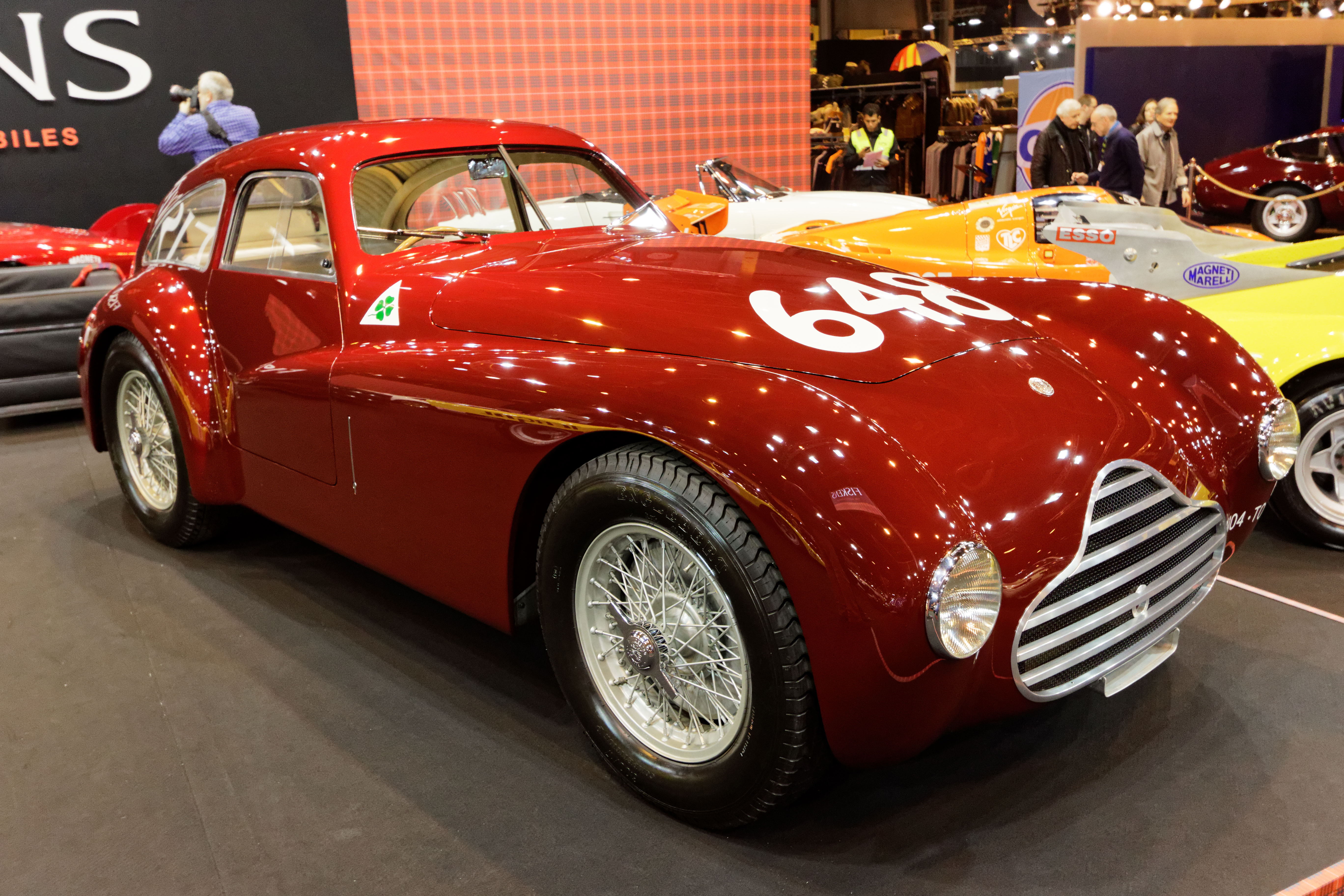 Une Alfa Romeo 6C 2500 Competizione Coupé de 1948 exposée lors du salon Rétromobile 2016.